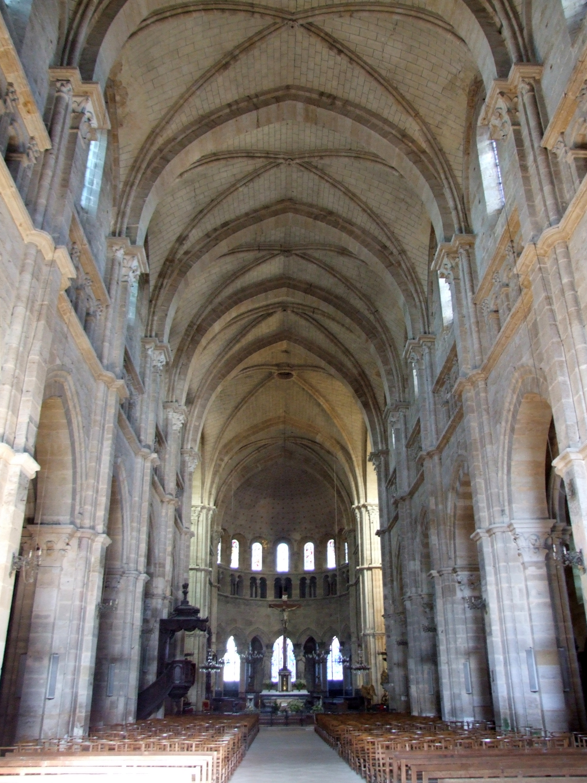 Cathédrale Saint-Mammès de Langres, FRANCE